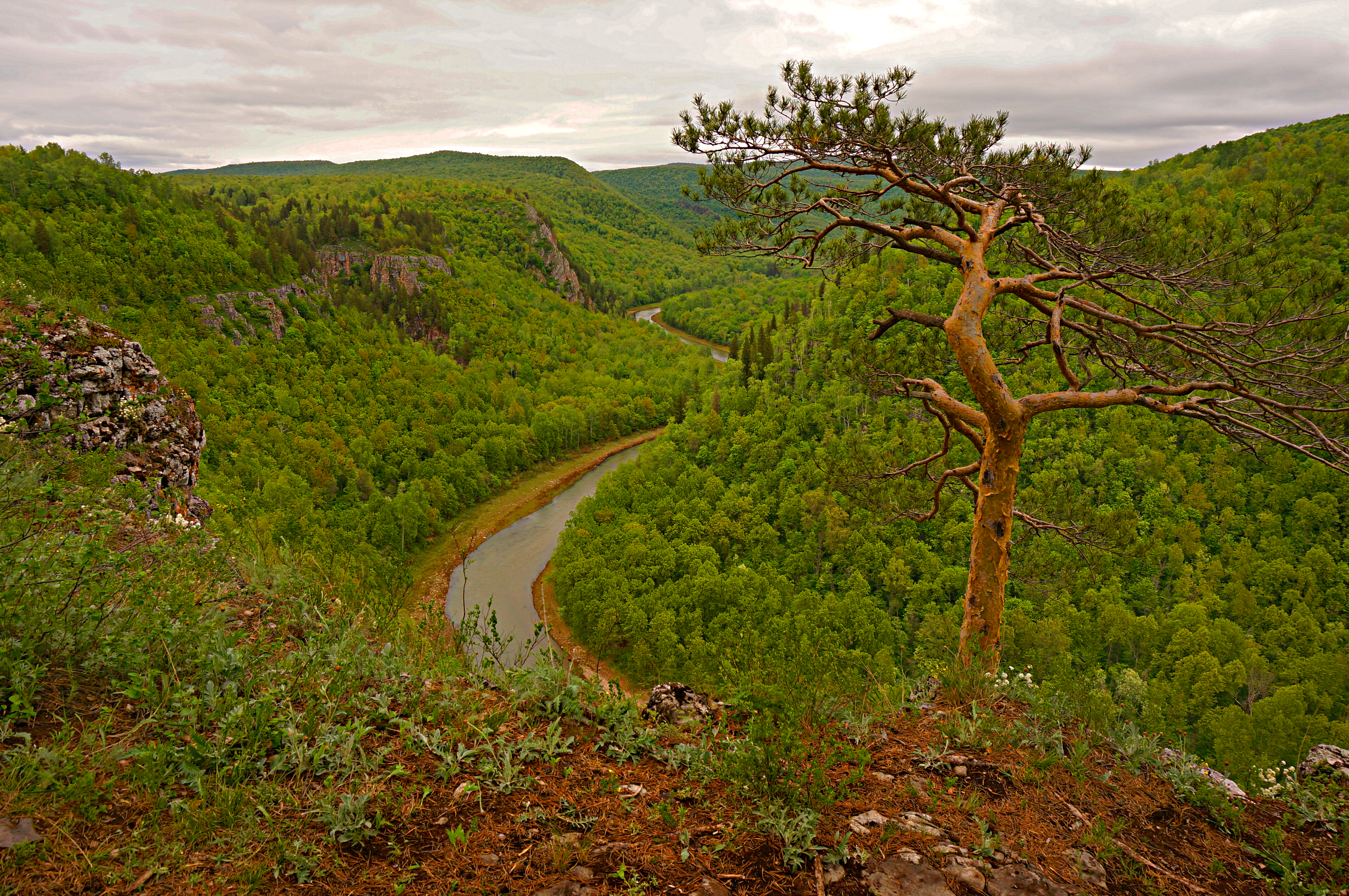 Башкирия: Национальный парк расположен на юго-западных склонах Южного Урала, к западу от водораздельного хребта Уралтау, в юго-восточной части Башкирии,Бурзянский район, Башкортостан This image is related to the protected area of Russia number 0200098